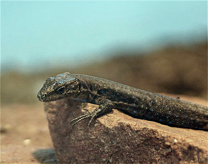 Armenische Gebirgseidechse (Lacerta armeniaca)